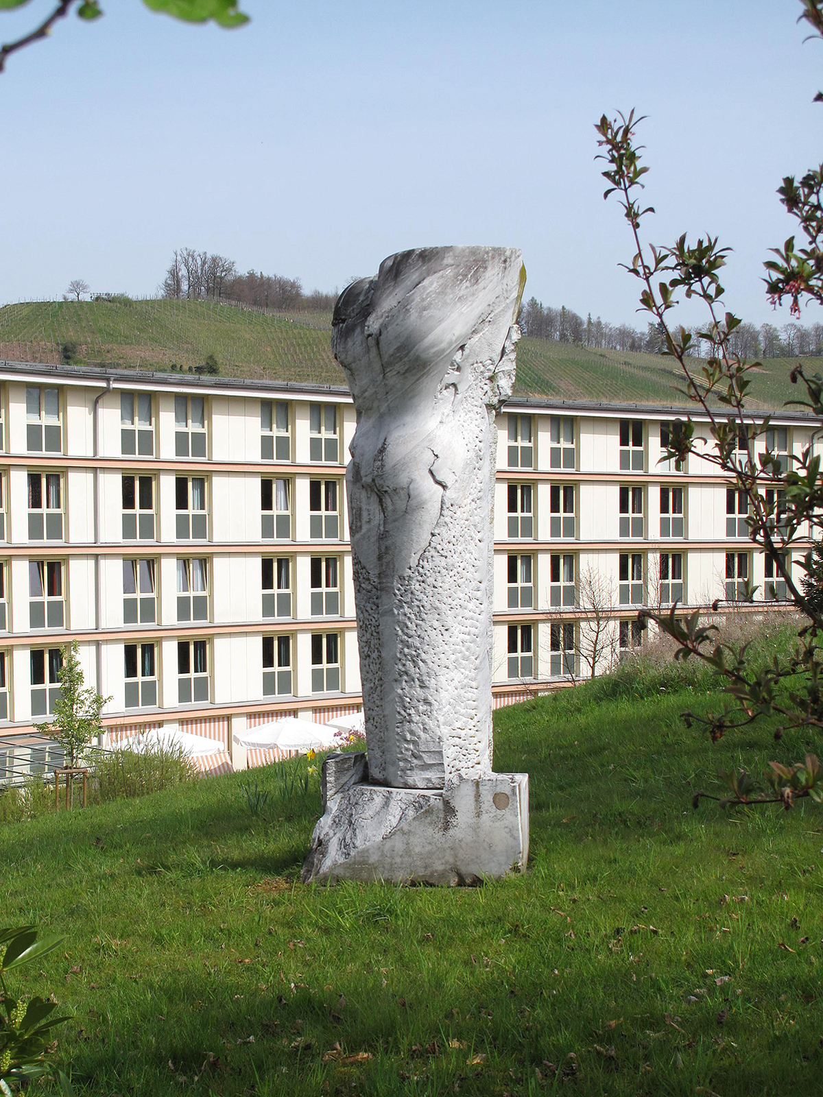 Yves Banchelin, Stehender Torso, 1998